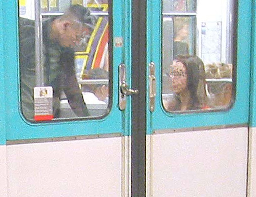 Zoom sur un loqueteau sur une rame type MP59 du métro de Paris